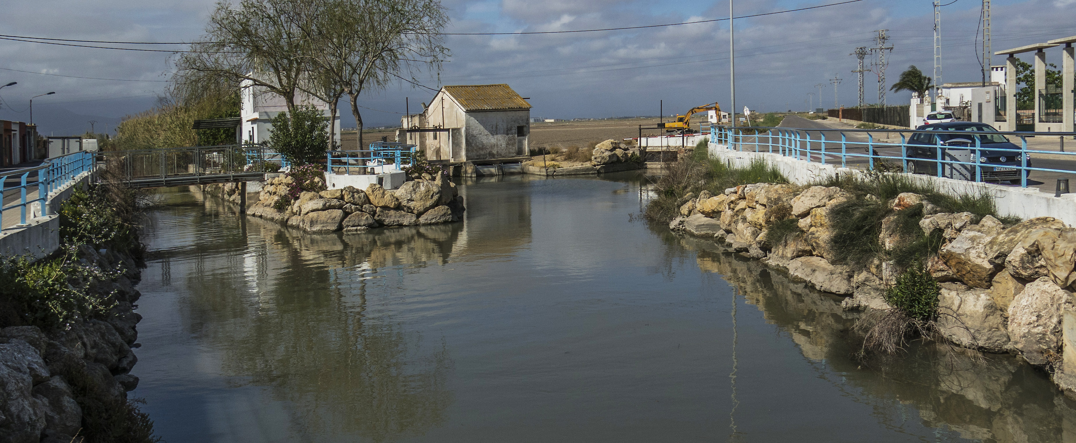 Mareny de Barraquetes és una localitat del País Valencià, antiga pedania del municipi de Sueca i des del 12 de desembre de 1999, definida com a entitat d'àmbit territorial inferior al municipi, EATIM. Es troba enclavat en el Parc Natural de l'Albufera de València i al costat de la mar (Viquipèdia)